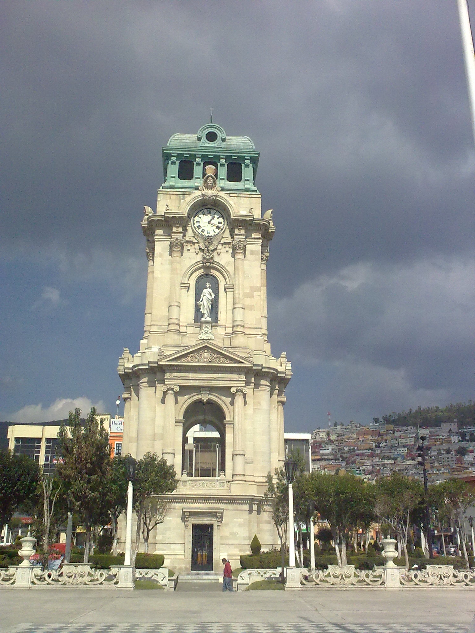 Reloj en la plaza principal de Pachuca